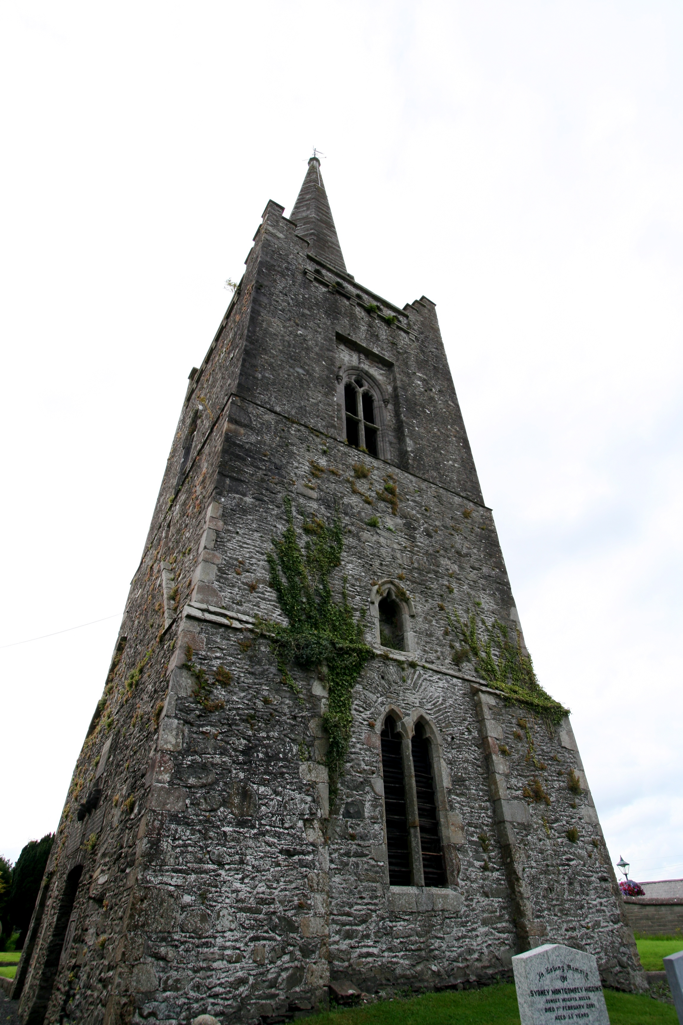 Kells Abbey, Kells, MeathMonasterio de Kells